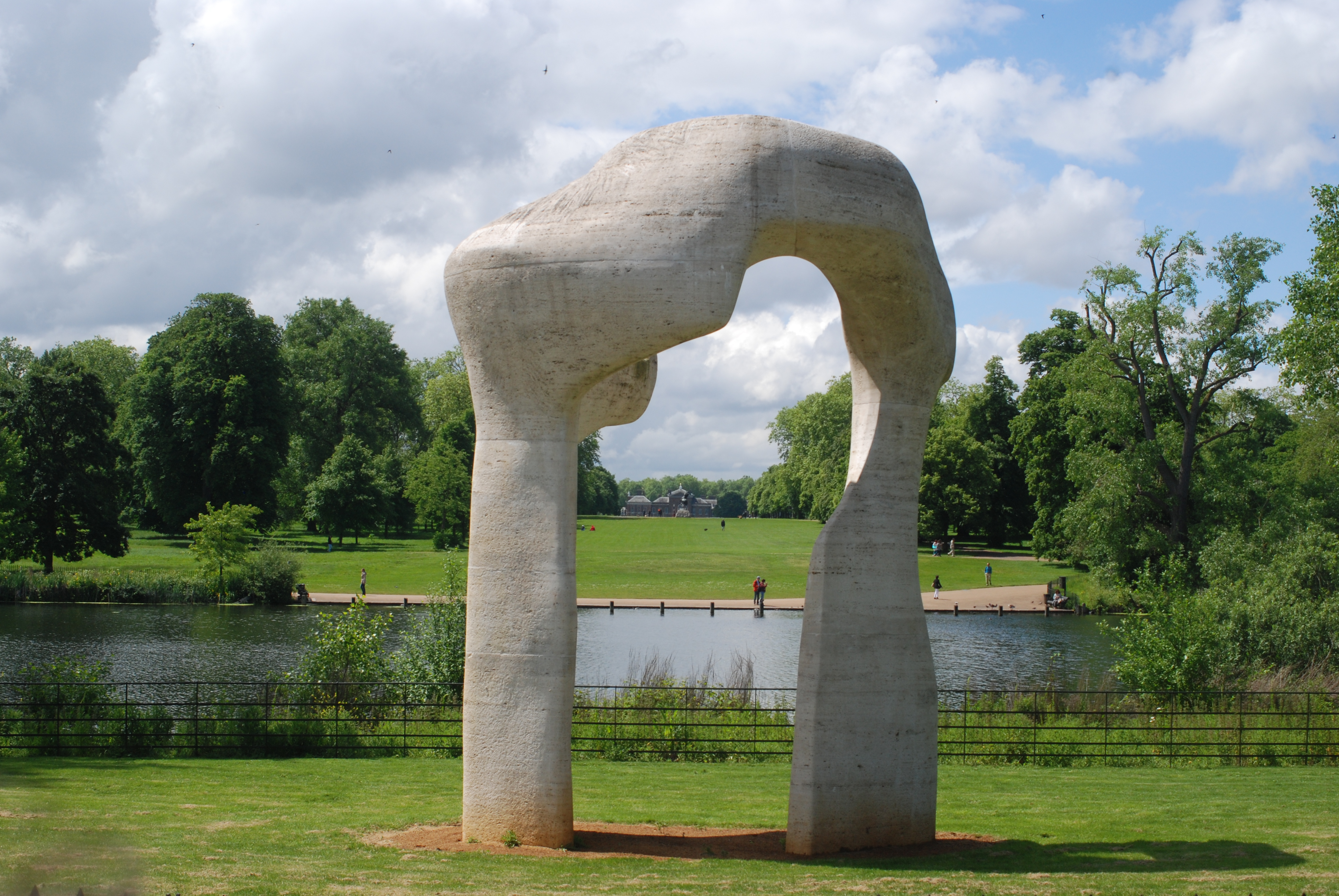 Henry Moore-Bogen im Hyde-Park